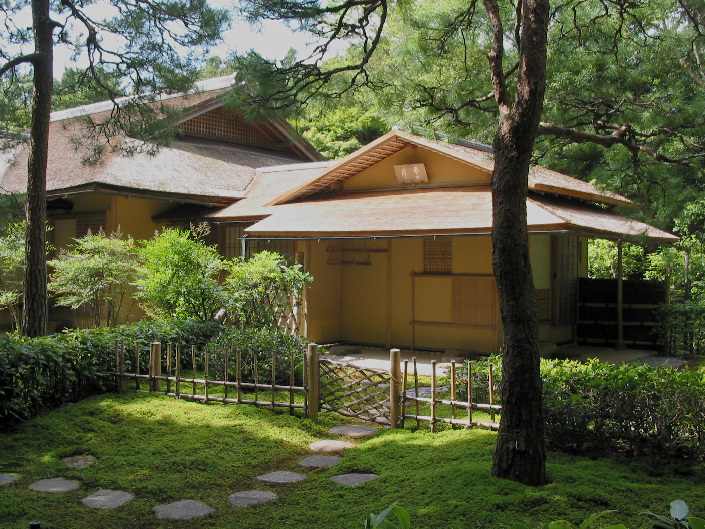 Jingu Chashitsu "Seigetsu"(Naiku, Ise Shrine) 神宮茶室 霽月（皇大神宮内）